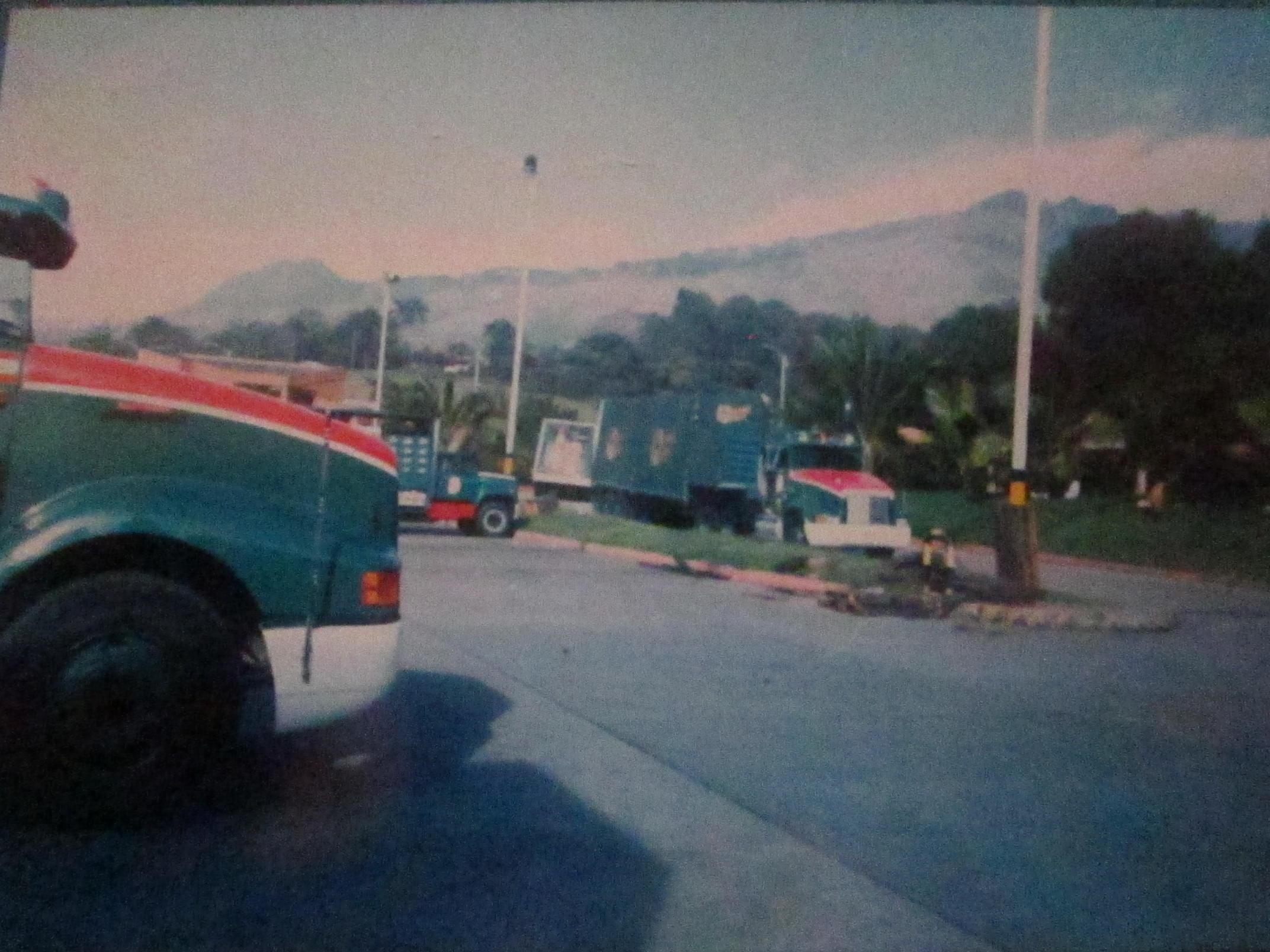 Foto Planta Cerveceria Leona S.A .